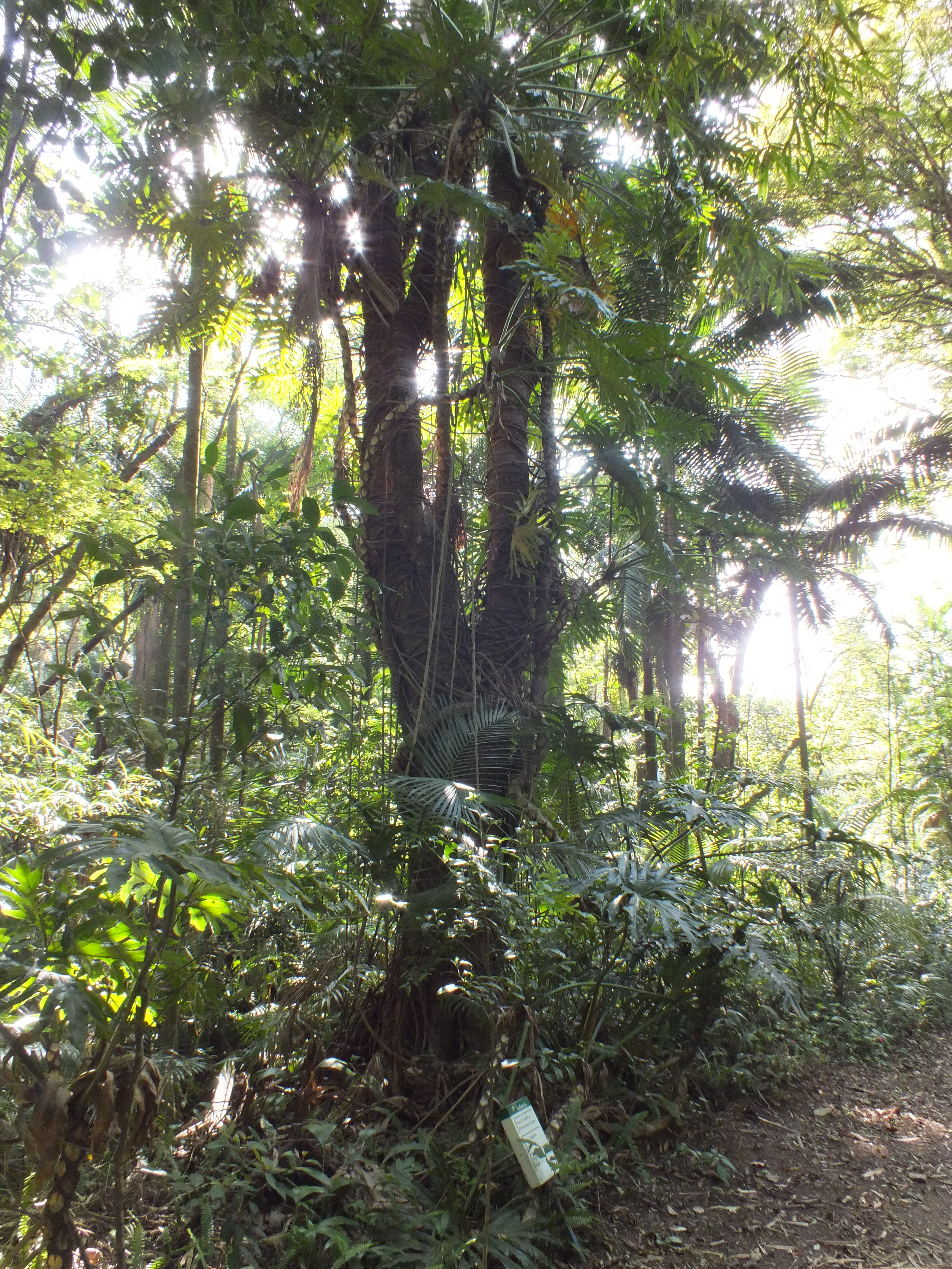 Entre a trilha A, do Parque Burle Marx, localizado no Panamby, pode ser encontrado diversas árvores e plantas remanescente de Mata Atlântica e de outras nacionalidades. Na imagem, vemos uma relação de "Epifitismo" entre o Guaibé e uma árvore (observação- epifitismo é o modo de vida de algumas plantas, sendo descrito como o apoio destas em outras vegetações sem retirar nutrientes)